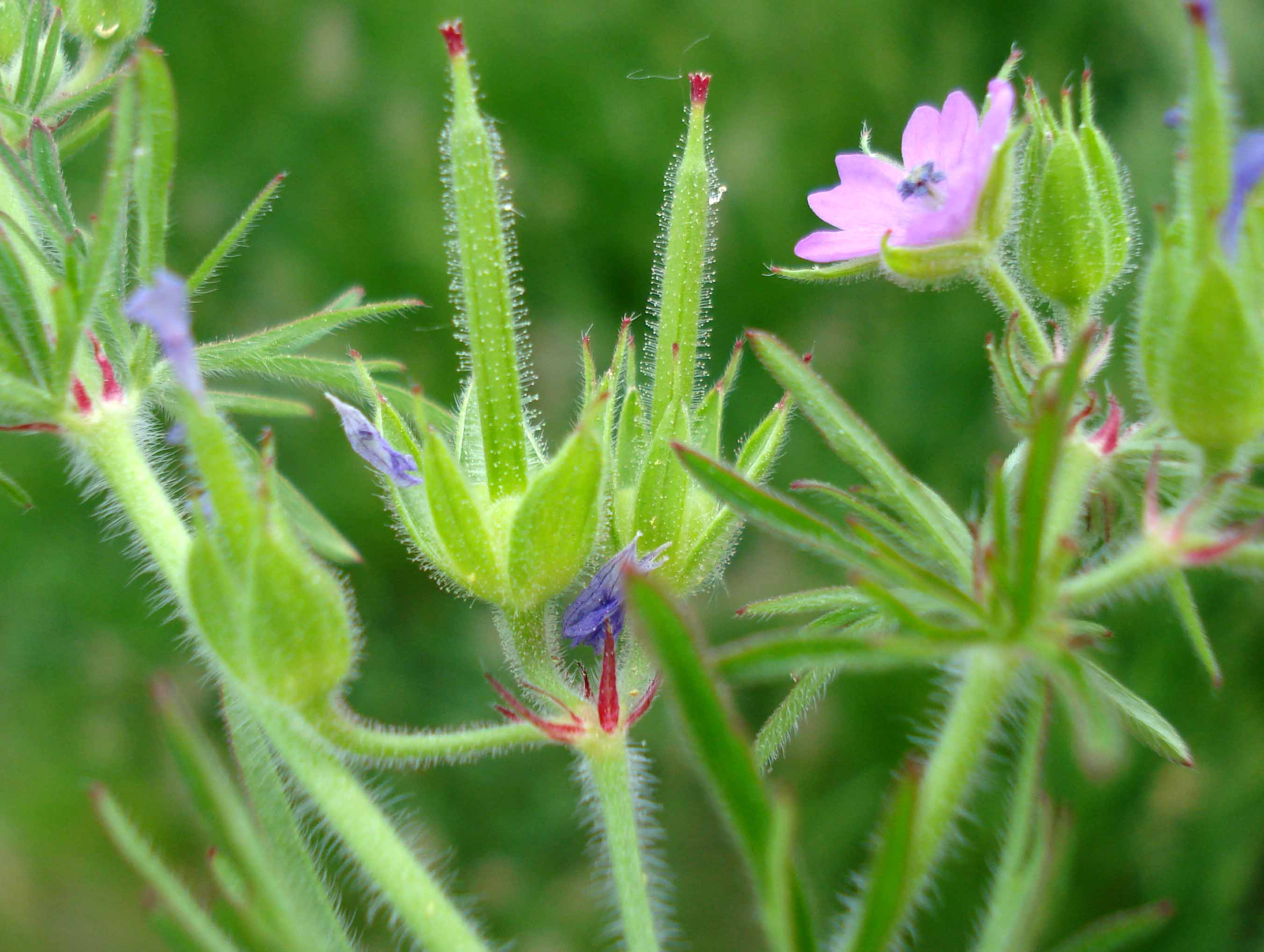 Geranium dissectum (Unterfranken, Germany)